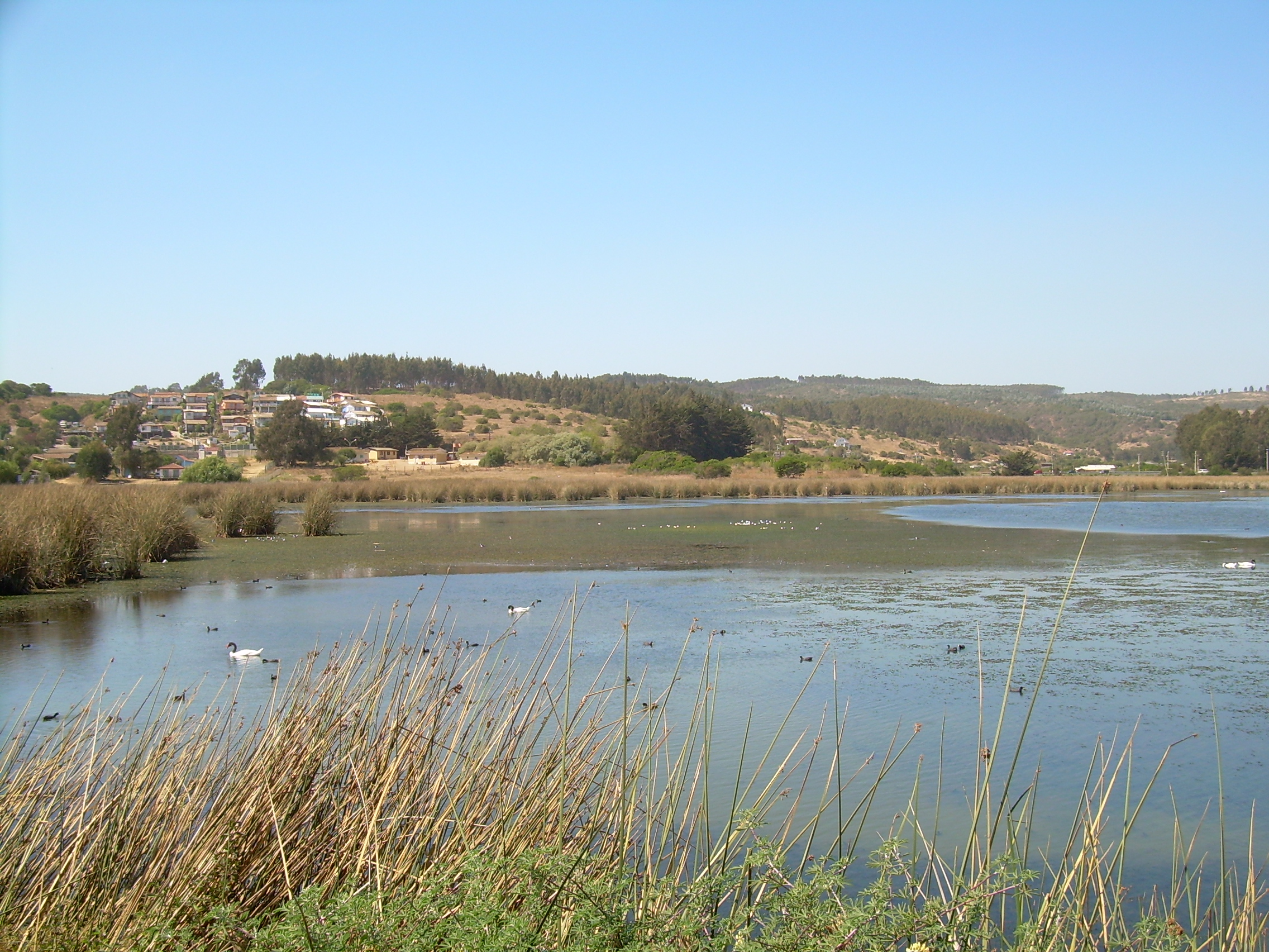 Comuna El Tabo, Valparaíso, Chile.